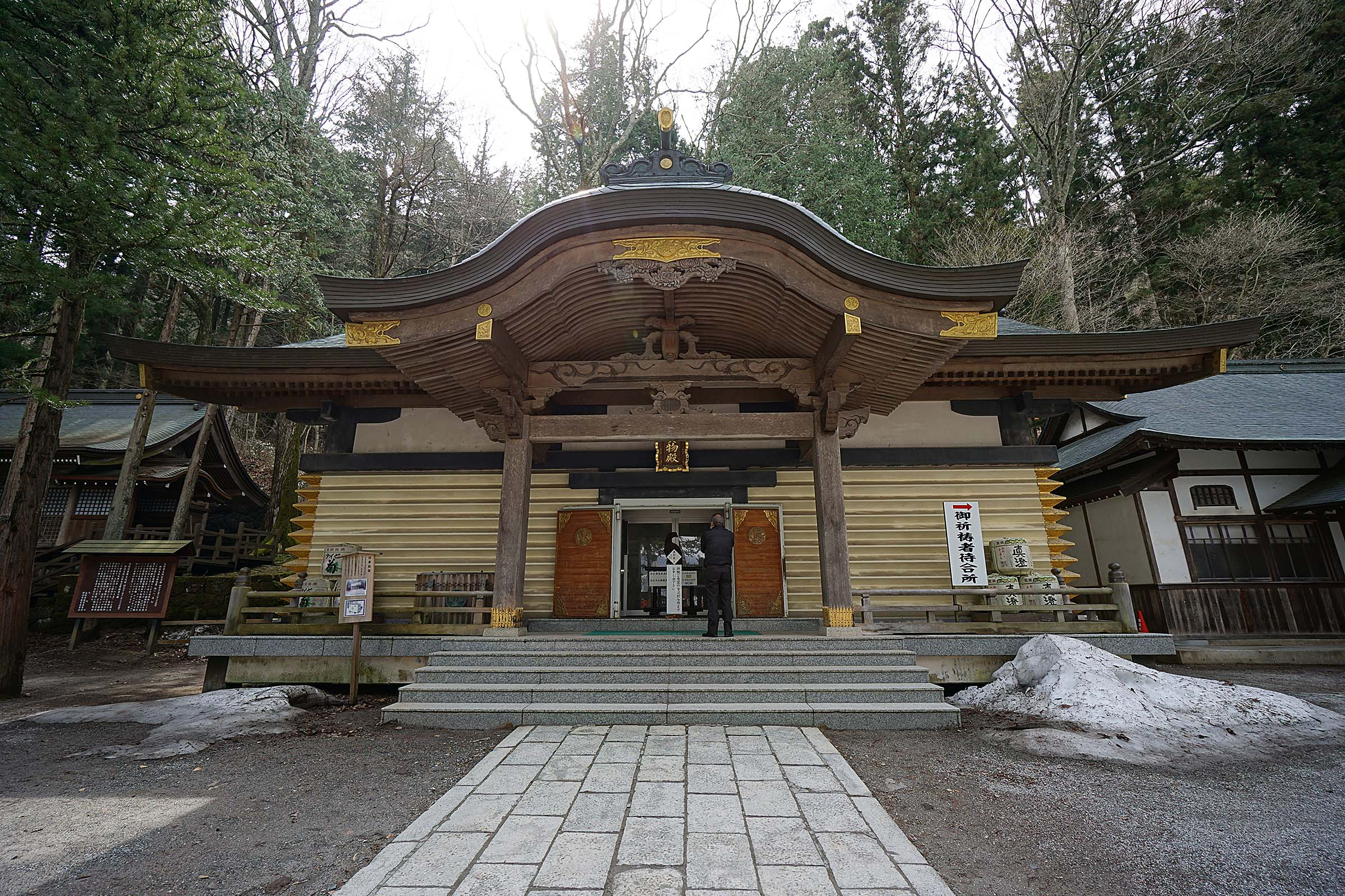 Suwa taisha Kamisha Honmiya , 諏訪大社 上社 本宮